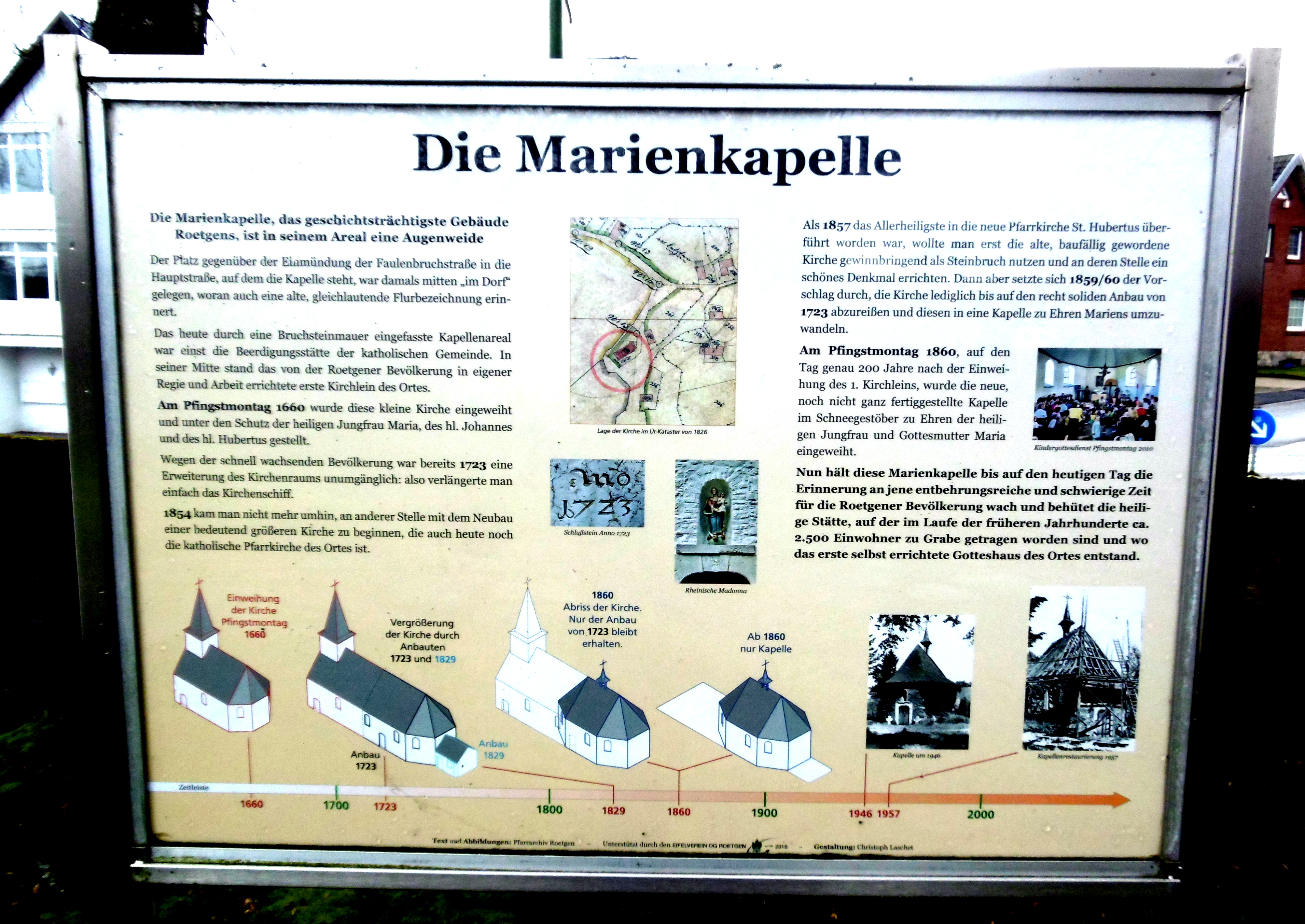 Hinweistafel an der Marienkapelle Roetgen